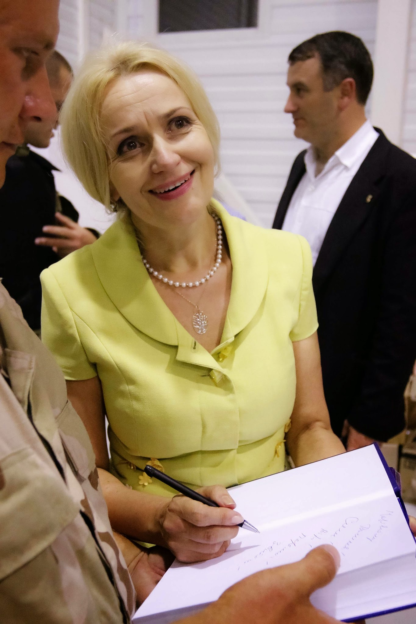 Батальйон Січ